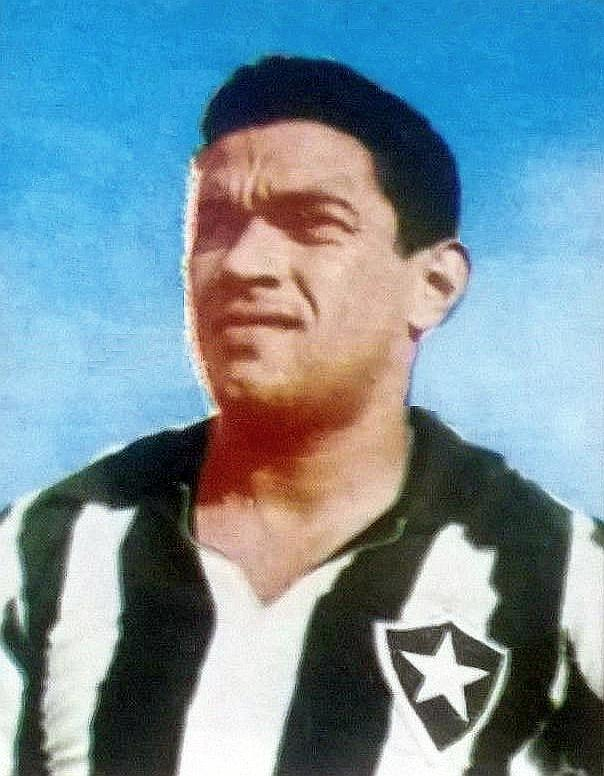 Garrincha - Campioni dello Sport 1966-1967, n°192